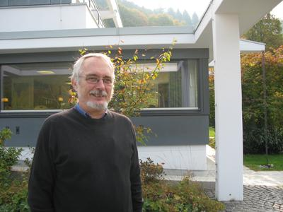 Foto di Eckart Viehweg